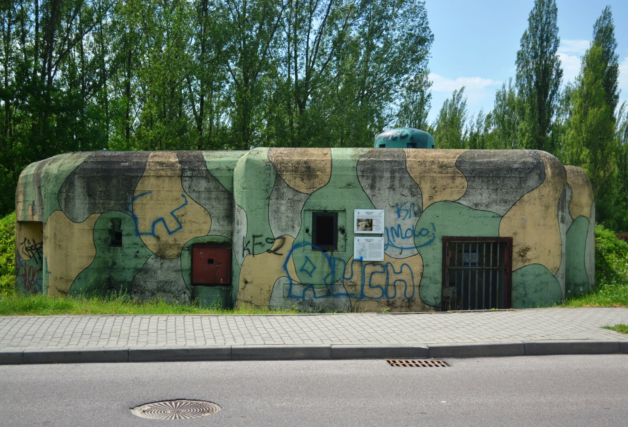 Ruda Śląska - schron bojowy w Czarnym Lesie